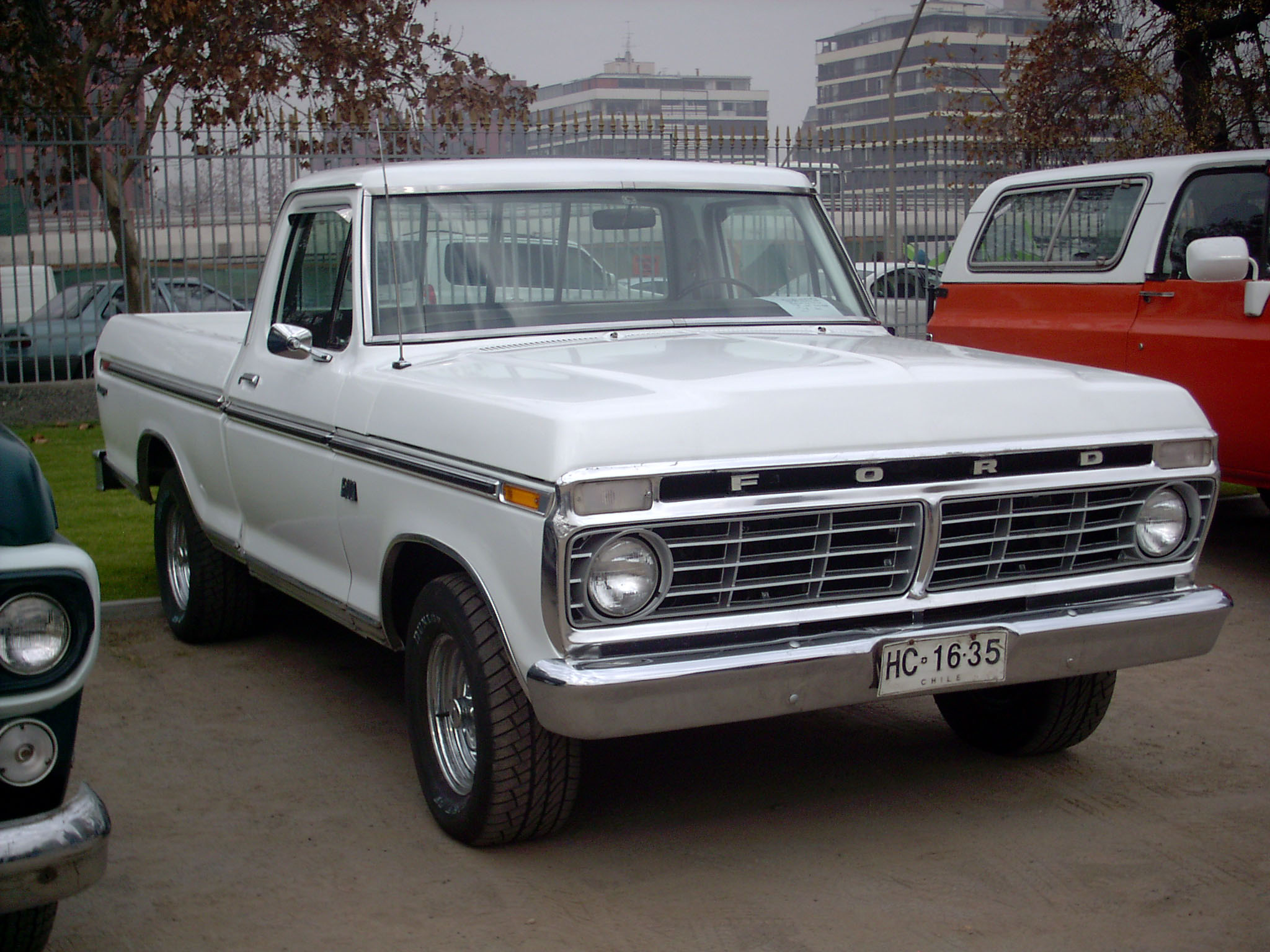 Ford F-100 Ranger 1975